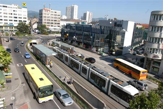 Hinsenkamplatz in Urfahr